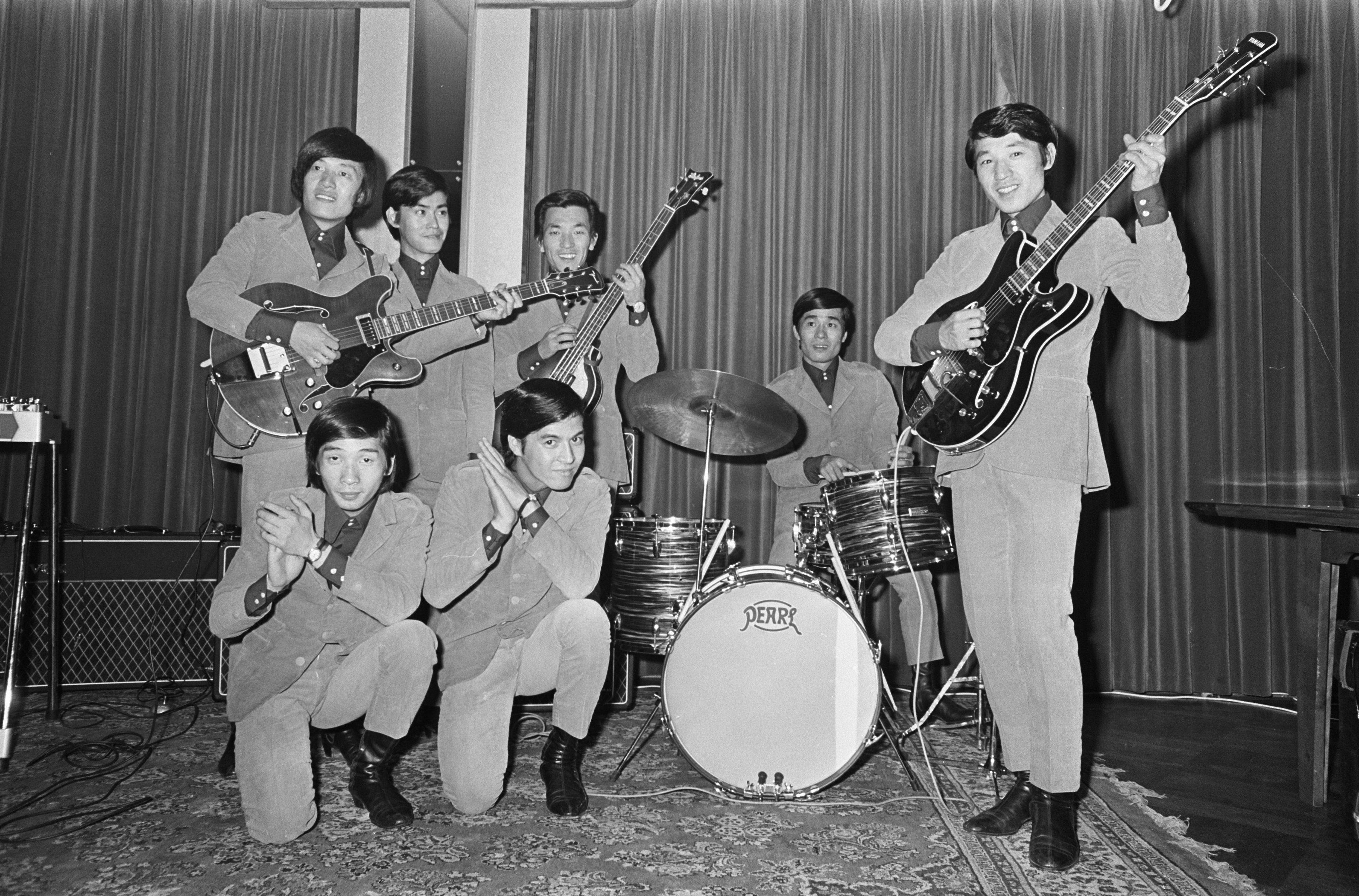 Nationaal Archief Beschrijving: Japanse groep The Spiders in ons land Datum: 25 oktober 1966 Vervaardiger: Anefo / Nijs, Jac. de Bestanddeelnummer: 919-7175 URL: [1] Voor meer informatie over het Nationaal Archief: Voor meer foto's uit deze en andere collecties, bezoek onze Beeldbank:, U kunt ons helpen onze kennis van de fotocollecties te verrijken door tags en commentaren toe te voegen. Herkent u mensen of locaties of heeft u een bijzonder verhaal te vertellen bij één van de foto's, laat dan een reactie achter (als u ingelogd bent bij Flickr) of stuur een mailtje naar